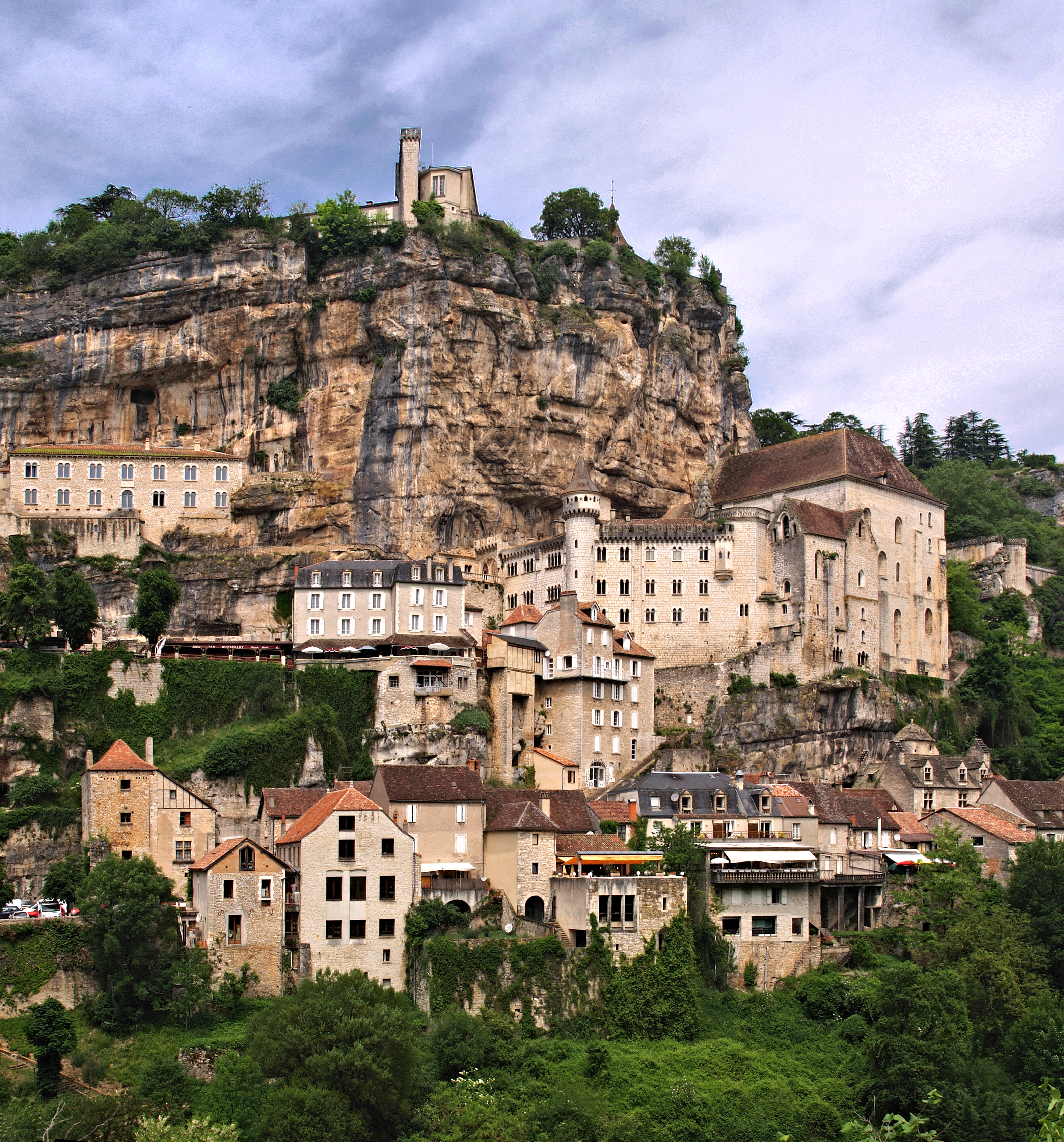 Rocamadour - Panorama sur la Maison à Marie, le Palais abbatial, les Sanctuaires et le château.